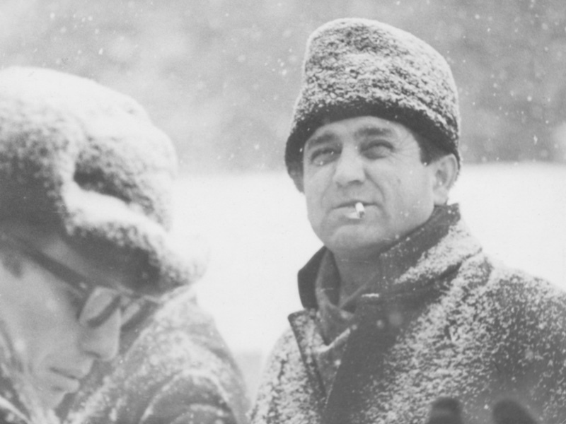 Moldavian painter Igor Vieru.